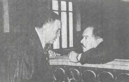 Salah Nasr in Court